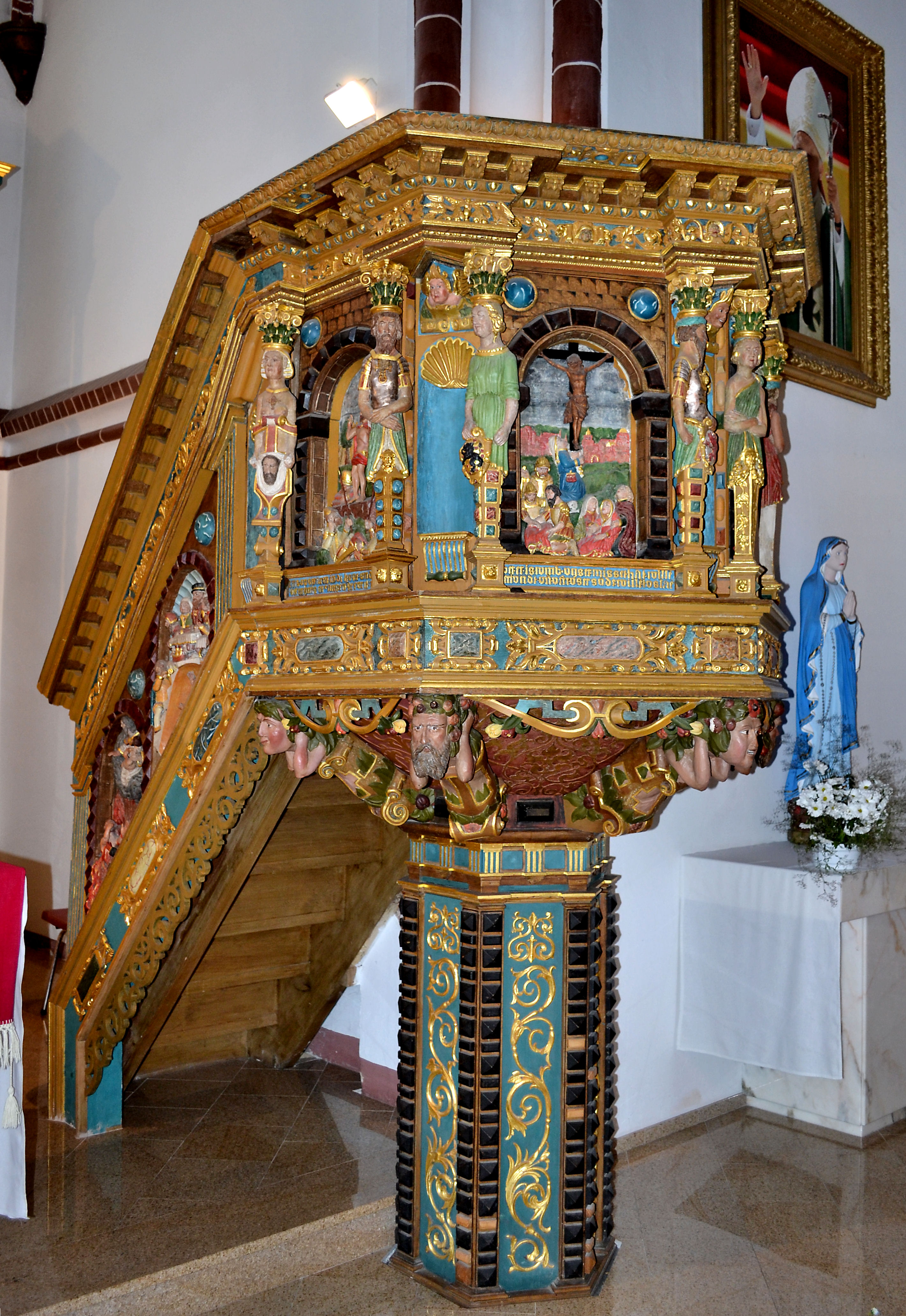 Ambona w kościele w Sownie (powiat stargardzki)